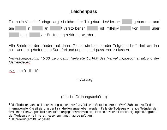 Vordruck für einen Leichenpass Deutschland